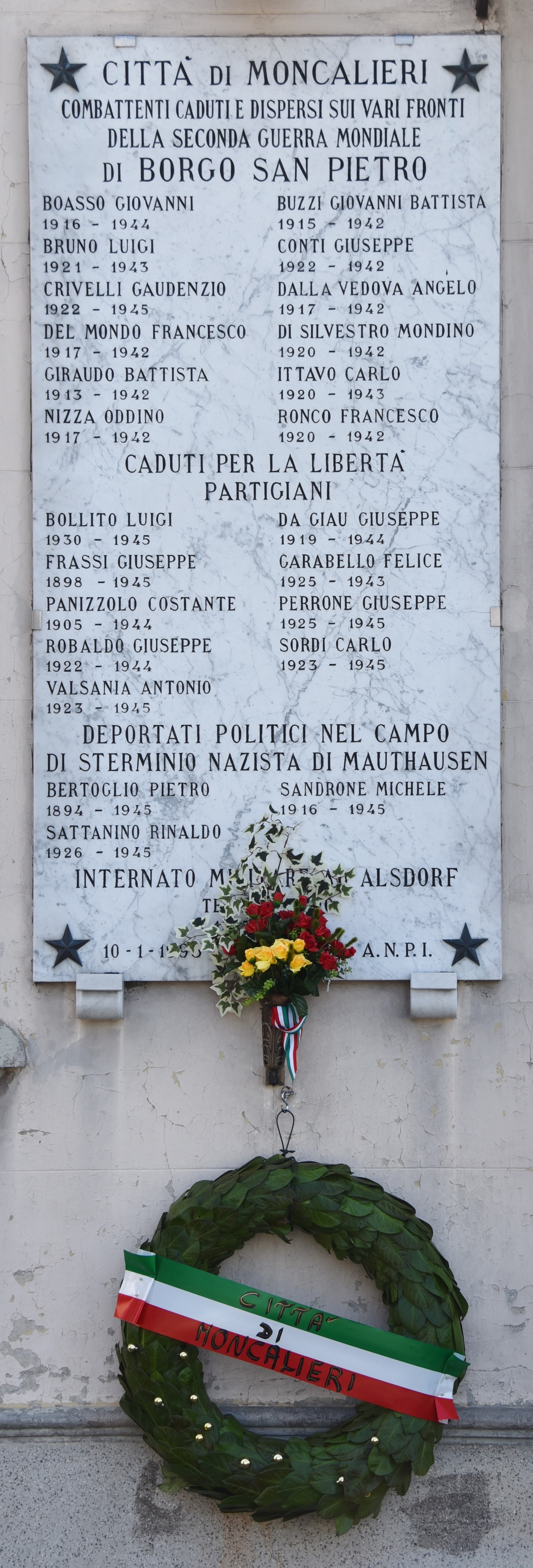 Giovanni Boasso 1916 - 1944, Luigi Bruni 1921 - 1943, Gaudenzio Crivelli 1922 - 1945, Francesco del Mondo 1917 - 1942, Battista Giraudo 1913 - 1942, Oddino Nizza 1917 - 1942, Giovanni Battista Buzzi 1915 - 1942, Giuseppe Conti 1922 - 1942, Angelo dalla Vedova 1917 - 1942, Mondino di Silvestro 1920 - 1942, Carlo Ittavo 1920 - 1943, Francesco Bonco 1920 - 1942, Luigi Bollito 1930 - 1945, Giuseppe Frassi 1898 - 1945, Costante Panizzolo 1905 - 1944, Giuseppe Robaldo 1922 - 1944, Antonio Valsani 1923 - 1945, Giuseppe da Giau 1919 - 1944, Felice Garabello 1925 - 1943, Giuseppe Perrone 1925 - 1945, Carlo Sordi 1923 - 1945, Pietro Bertoglio 1894 - 1945, Rinaldo Sattanino 1926 - 1945, Michele Sandrone 1916 - 1945